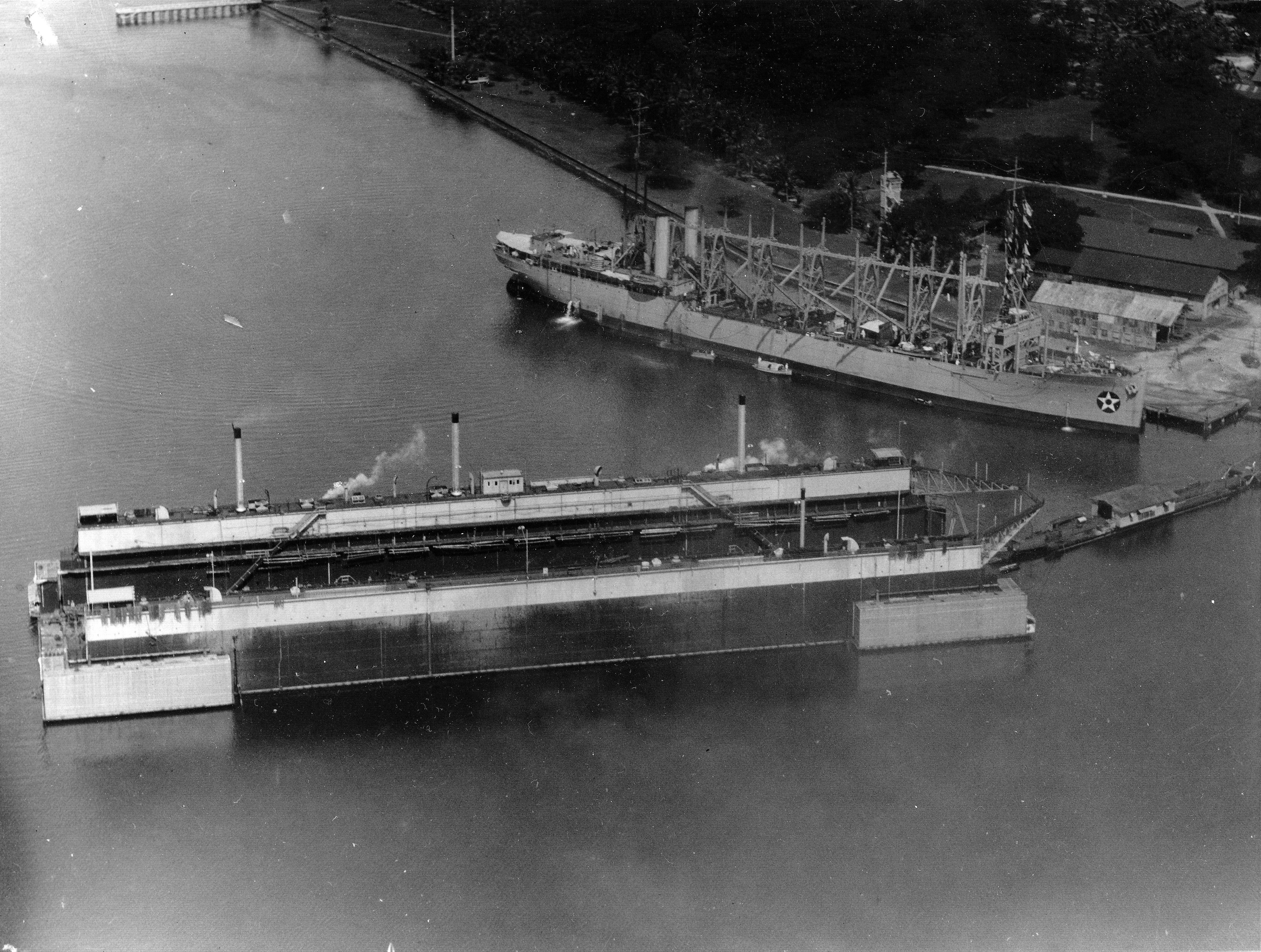 Dewey Drydock with USS Jason (1928)